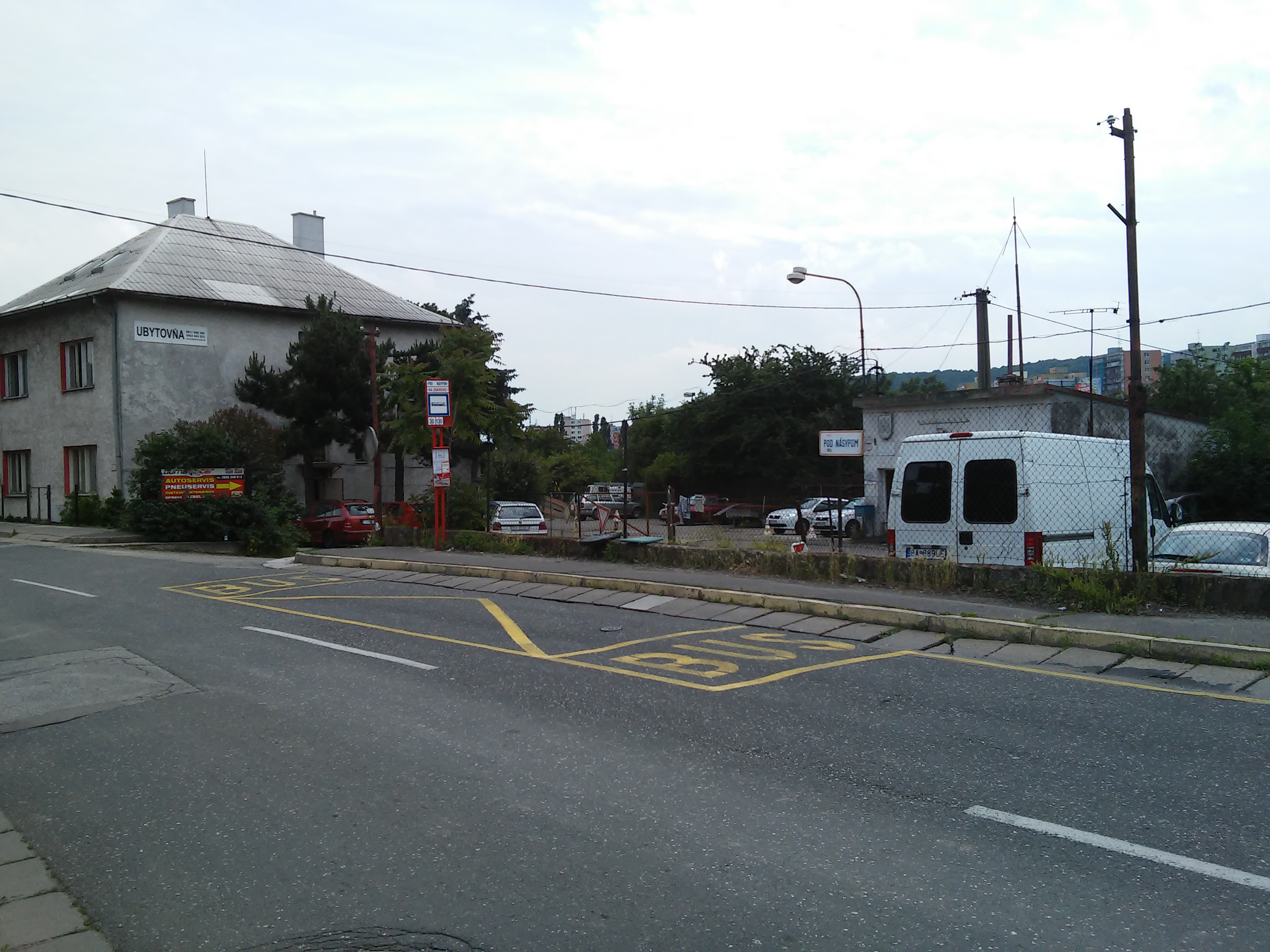 Pod násypom, Lamač, Bratislava